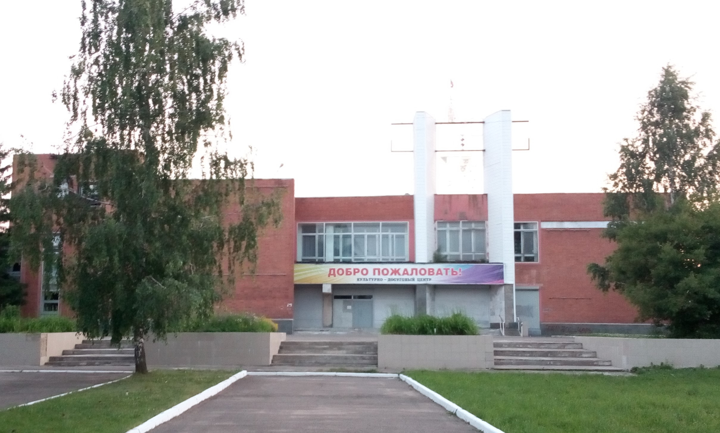 Вид на Шурскольский сельский Дом культуры (СДК) (фото июнь 2018 г.)